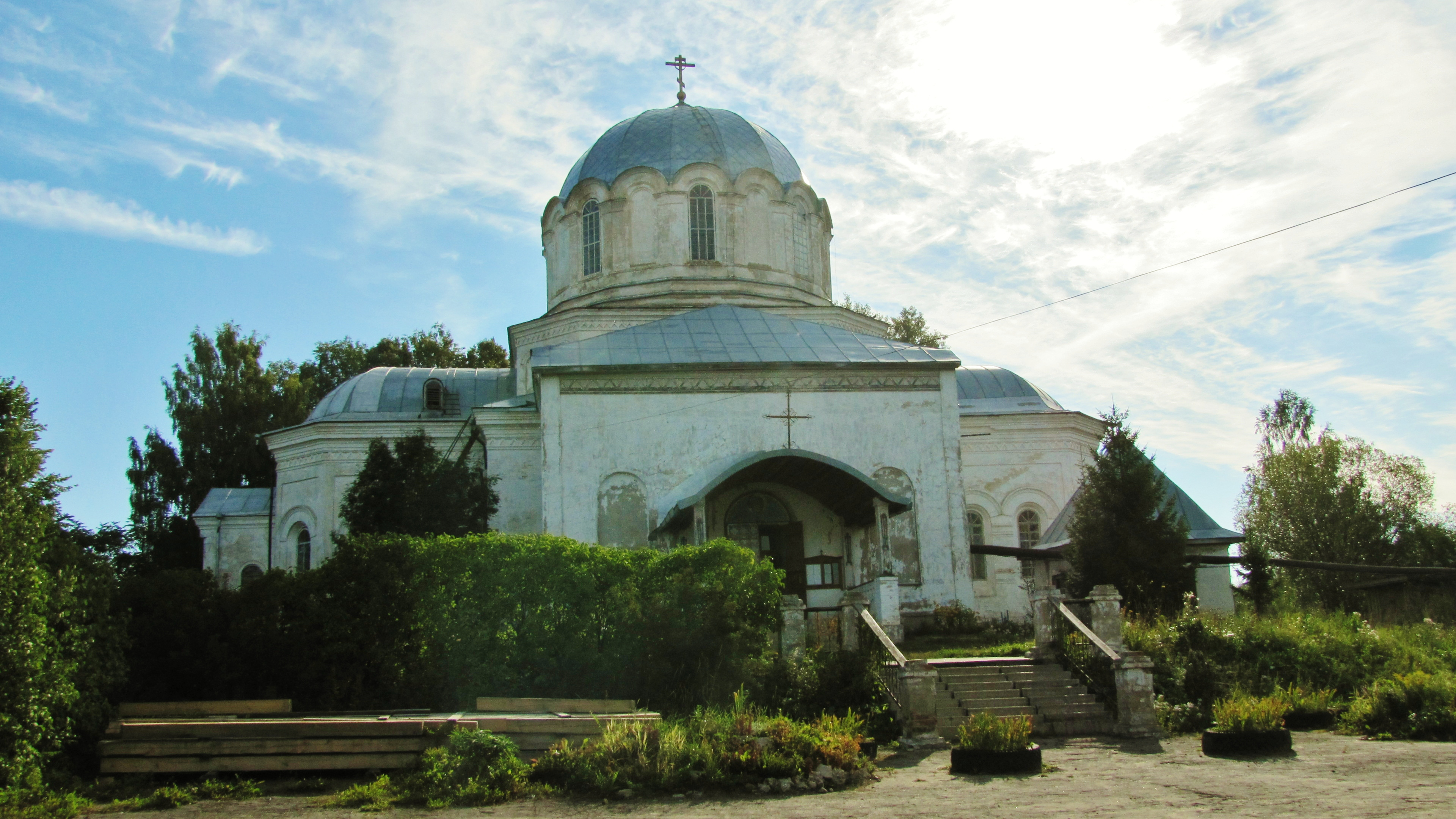 г. Никольск